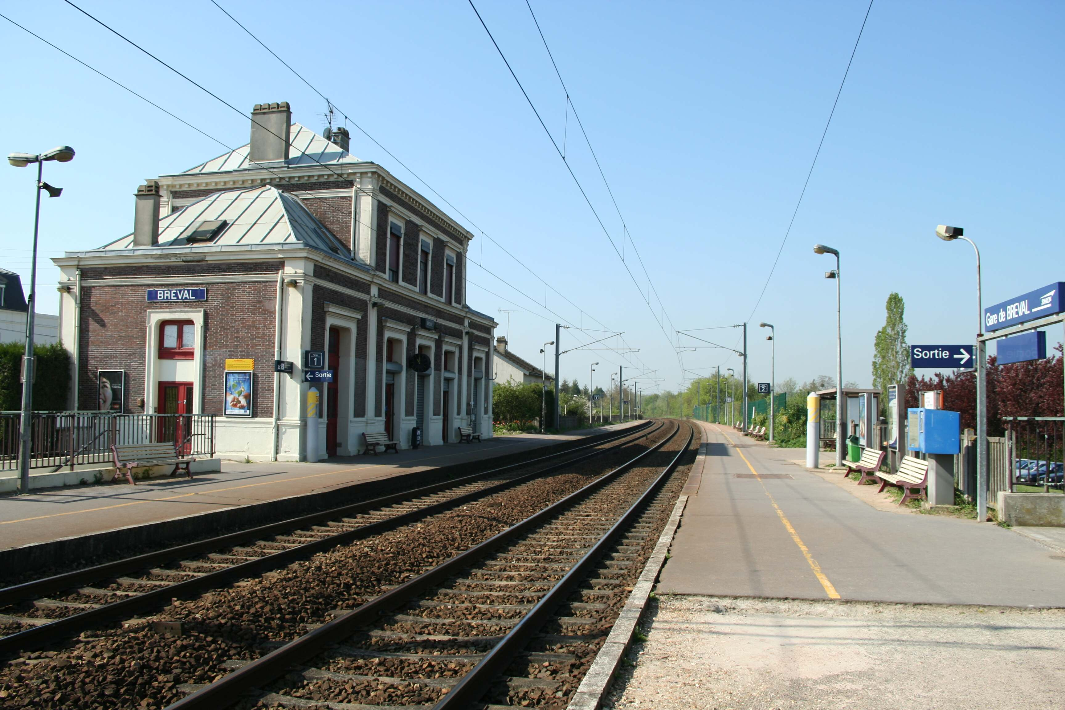 Gare de Bréval - Yvelines (France)